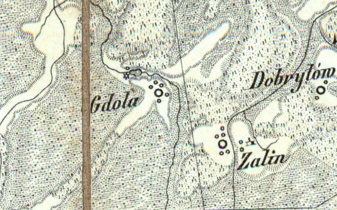 Gdola (pow. chełmski) na mapie D.G. Reymanna (XIX w.)